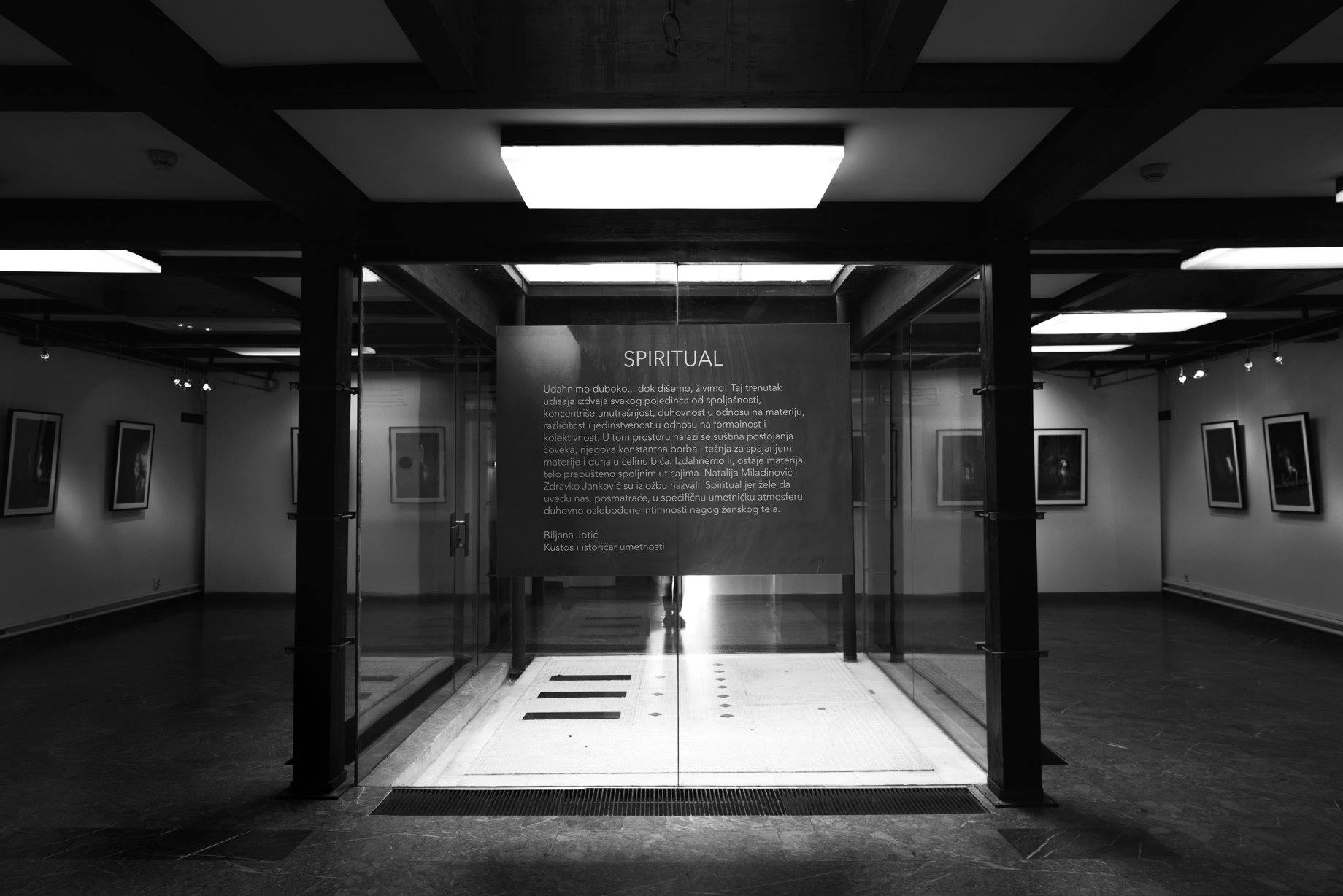 Izložba spiritual Natalija Miladinović i Zdravko Janković Biblioteka grada Beograda